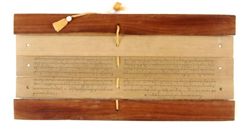 Handschrift. Geschrift op lontarblad